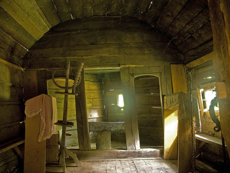 Vălari, interiorul navei spre altar.